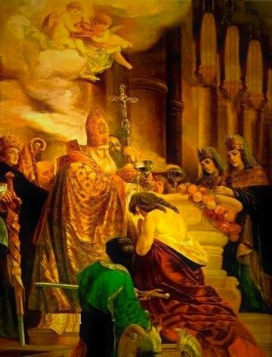 Սուրբ Գրիգոր Լուսավորիչը օծում է Տրդատ Մեծին